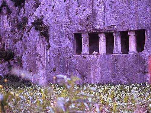 Paflagonya Kral Mezarları(Kayaiçi Oyma)